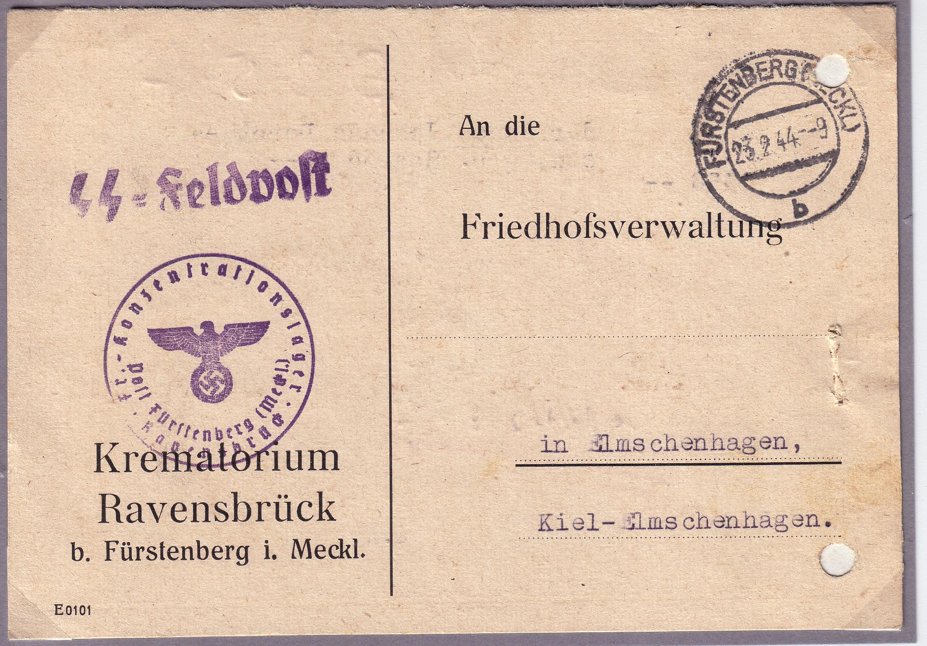 SS- Feldpostkarte des Krematoriums aus dem KZ Ravensbrück vom Februar 1944 Poststempel: "Fürstenberg" (Meckl.)